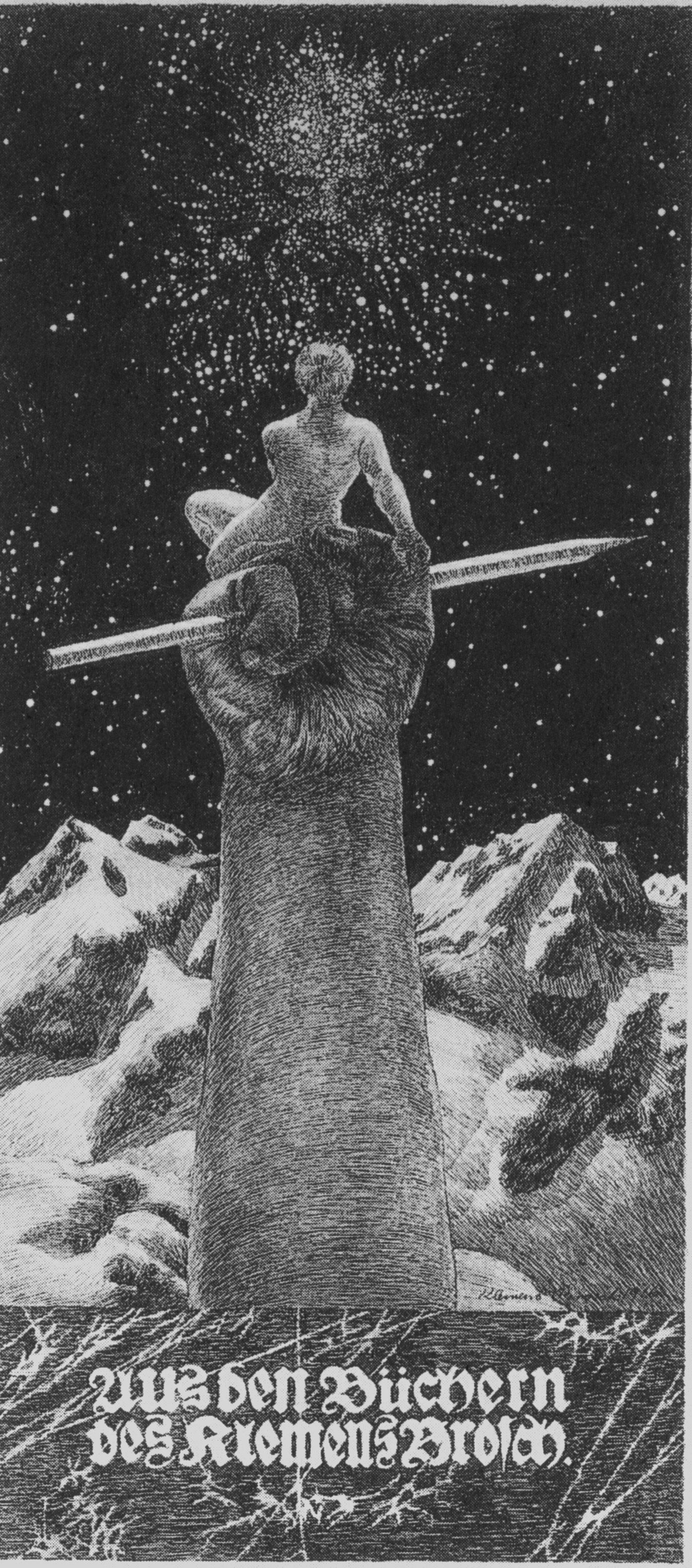 Bucheigenzeichen Klemens Brosch